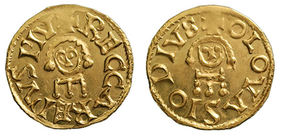 Imitación moderna (¿siglo XX?) de un tremis visigodo de oro acuñado en Olovasio durante el reinado de Recaredo I. Leyendas: anverso "+RECCAREDVS PIV." reverso "+OLOVASIO PIVS". Fuente: Ruth Pliego, La Moneda Visigoda, 2009, 926. Conservación: EBC+.